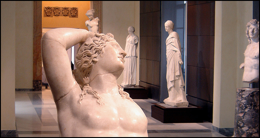 Galeria, Museu Capitolino, Roma